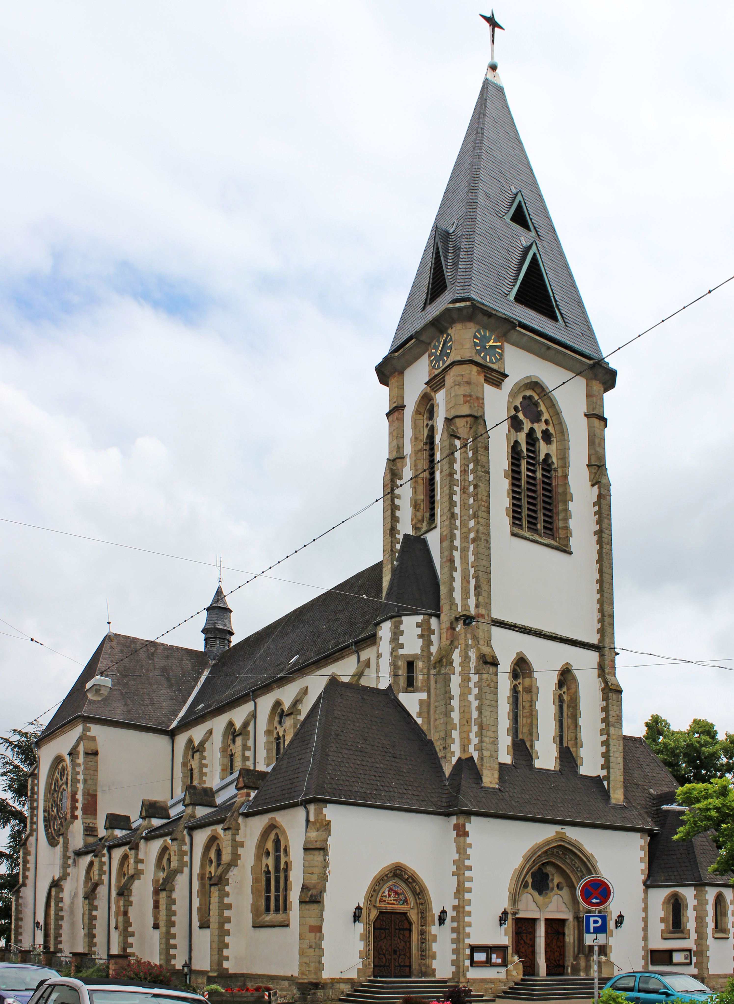 Die katholische Pfarrkirche St. Martin in Schwalbach, Landkreis Saarlouis, Saarland